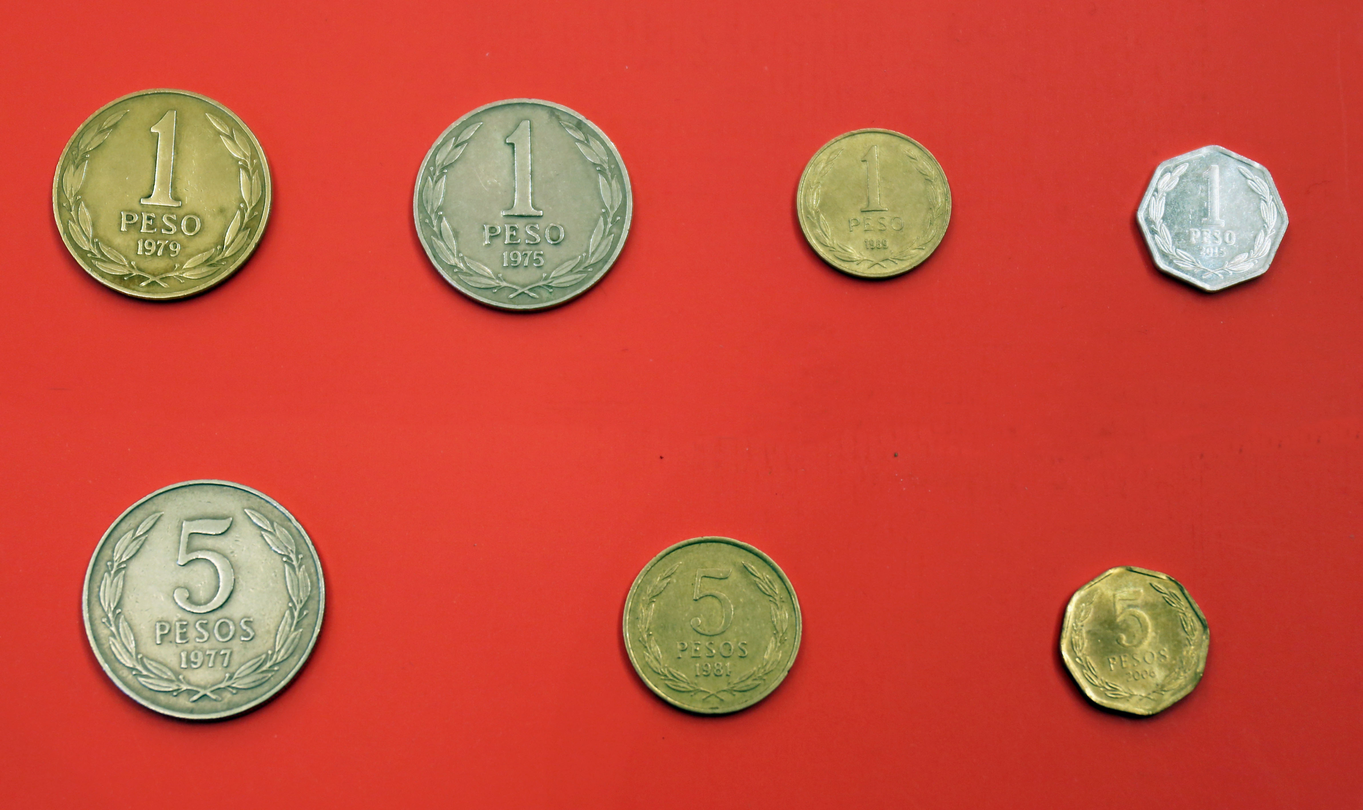 Las monedas de 1 y 5 acuñadas en la historia.